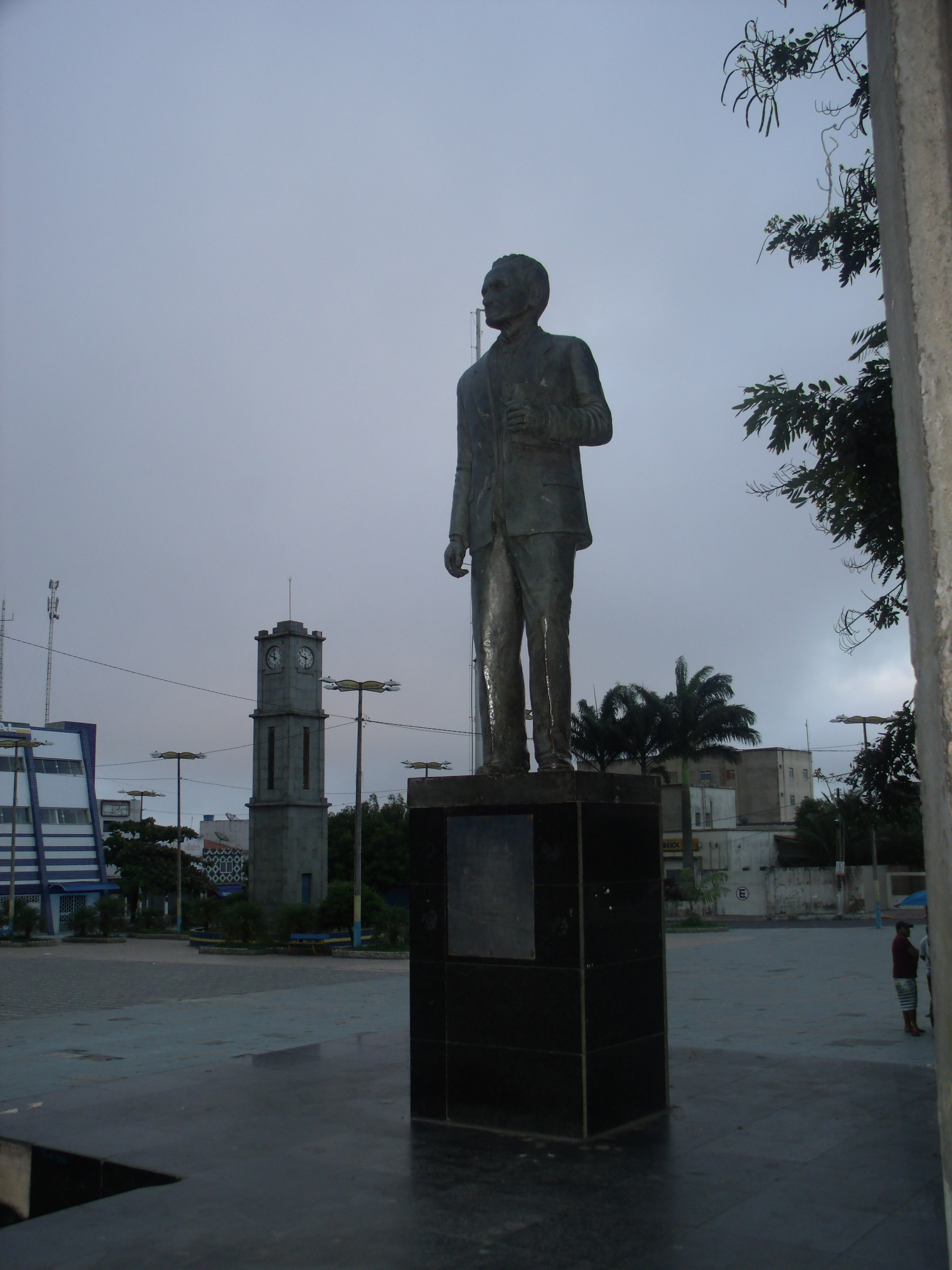 Estátua de Raimundo de Farias Brito em São benedito-CE